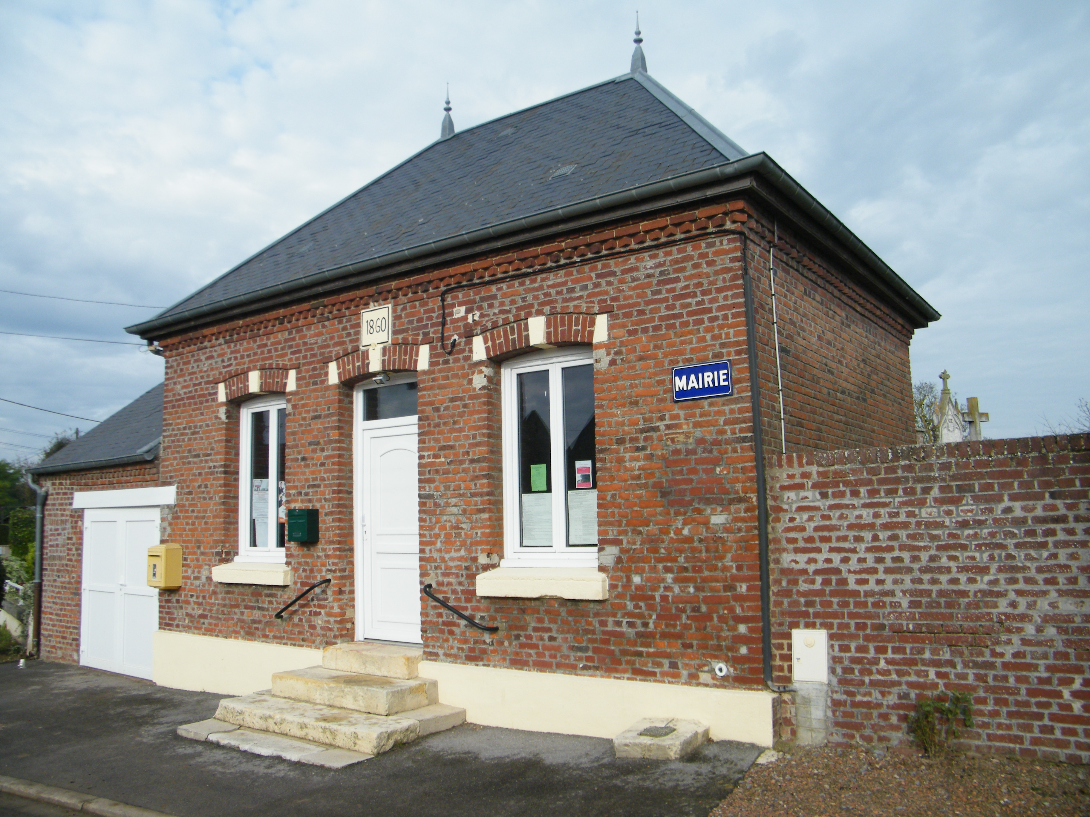 mairie.